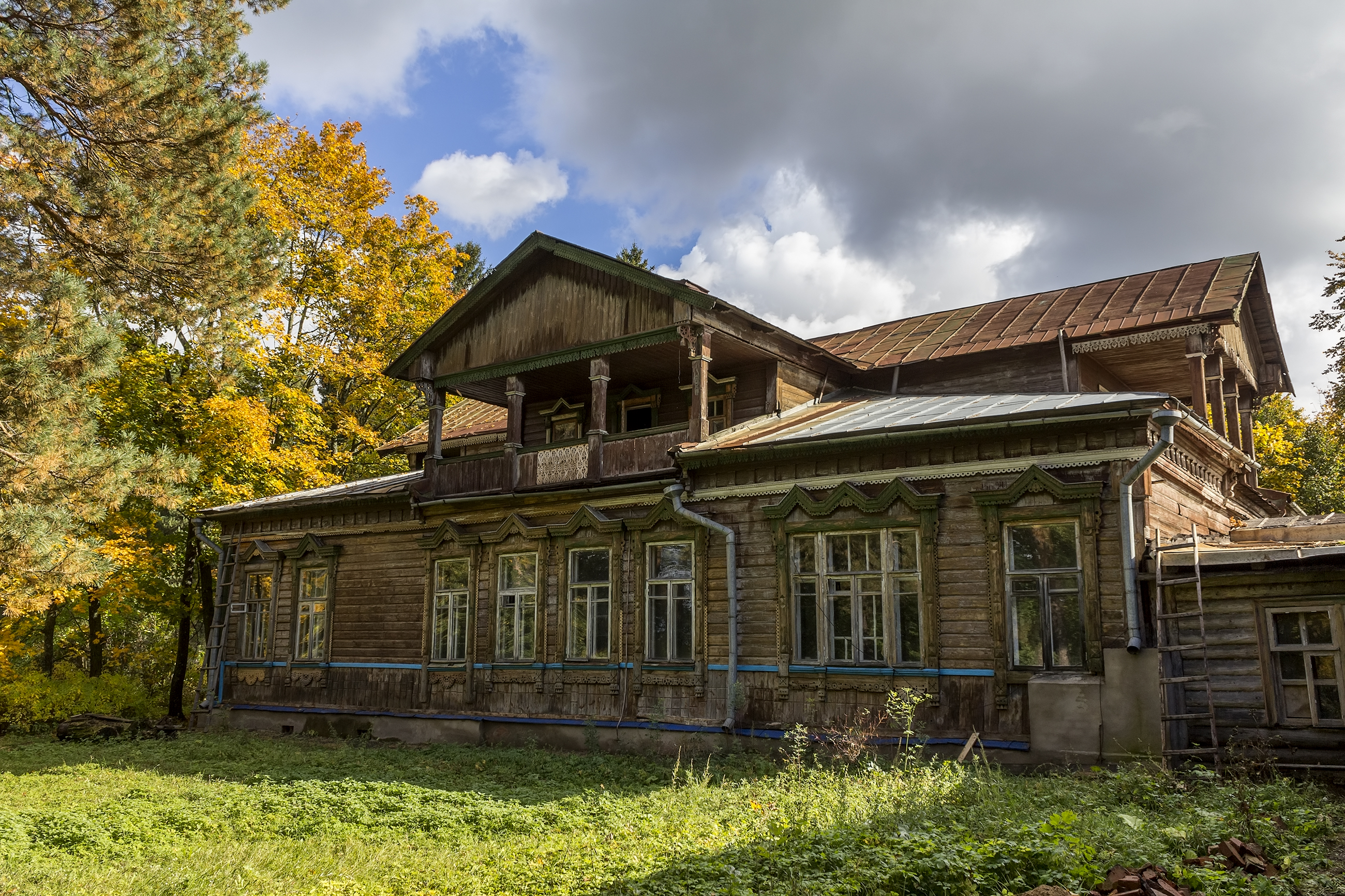 Главный дом: Крутец, Александровский район, Владимирская область